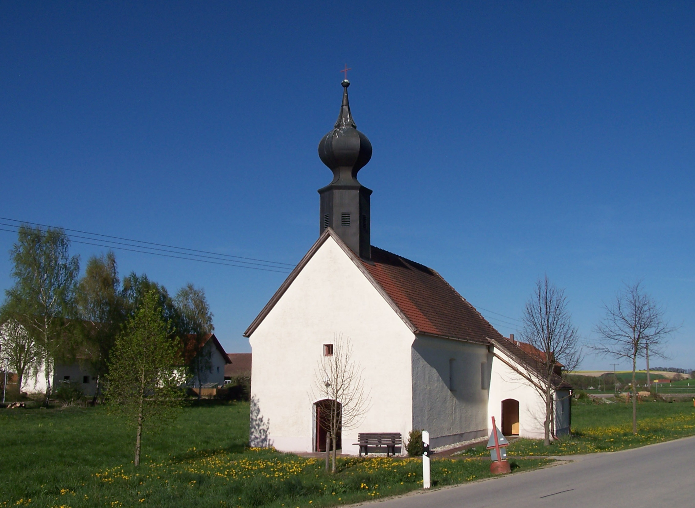 Pilsting, Oberdaching 9. Katholische Filialkirche St. Magdalena und Elisabeth, kleiner Saalbau mit nicht eingezogenem Chor und Dachreiter, wohl 17. Jahrhundert; mit Ausstattung.